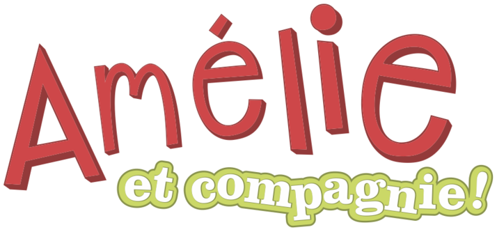 Logo officiel de la télésérie Amélie et compagnie !